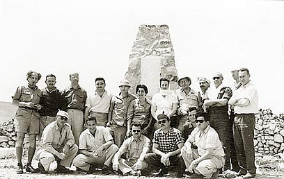 אנשי חיל המדע ליד מצבה שהוקמה לזכר חברם פיני סלע שנרצח במסגרת עבודתו בחמ"ד. משמאל פרופ' יעקב בן תור, שלישי משמאל פרופ' ישראל דוסטרובסקי, 1951.